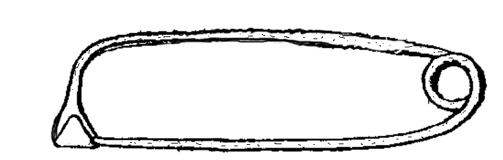 Illustration zur Konstruktion einer Peschiera Fibel